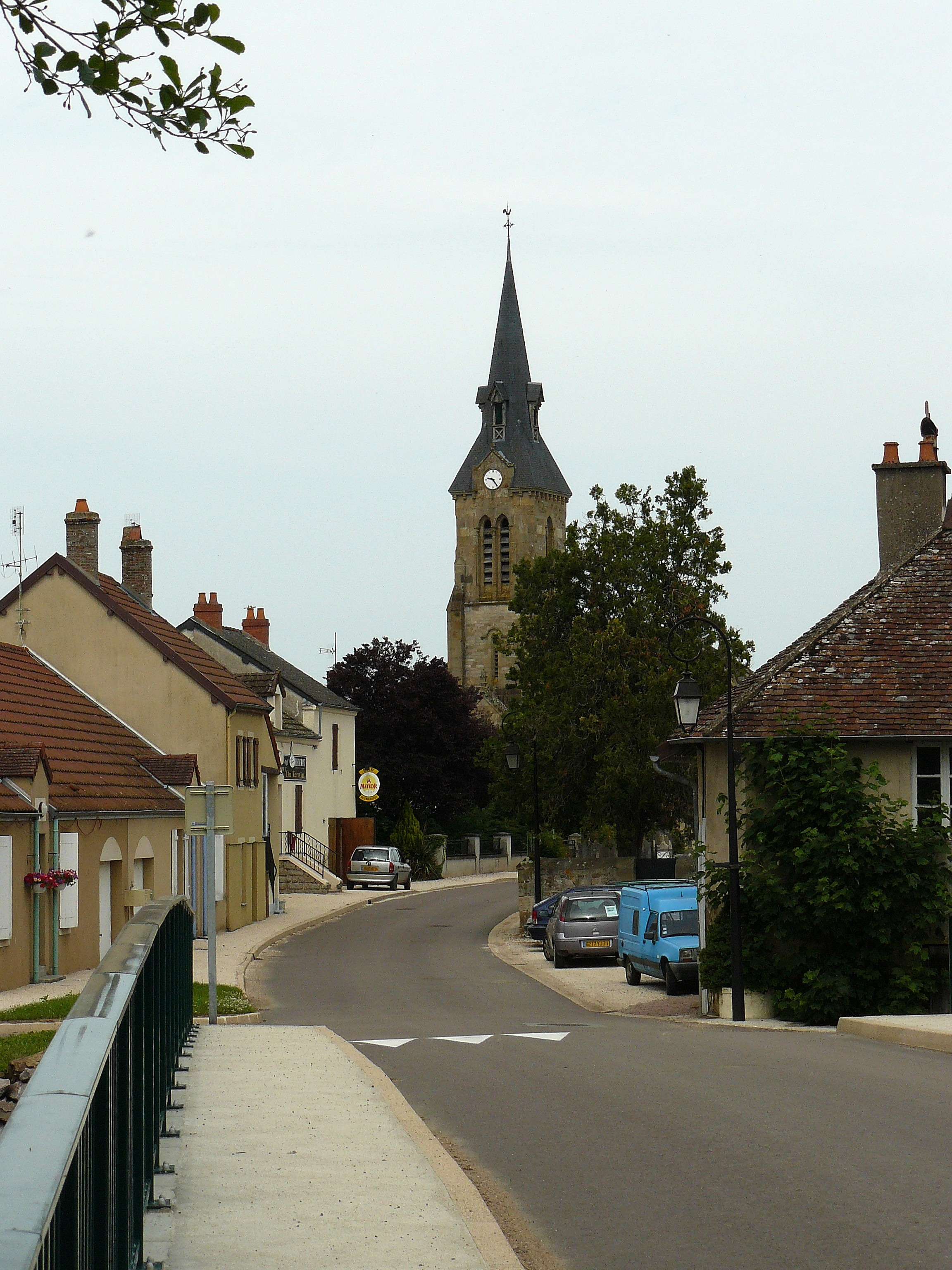 Tavernay (Saône-et-Loire, France) depuis le pont sur le Ternin